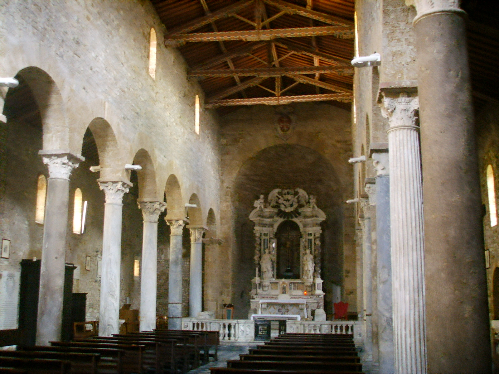 Chiesa_di_san_sisto,_interno